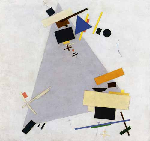 Картина Казимира Малевича 1915 года.